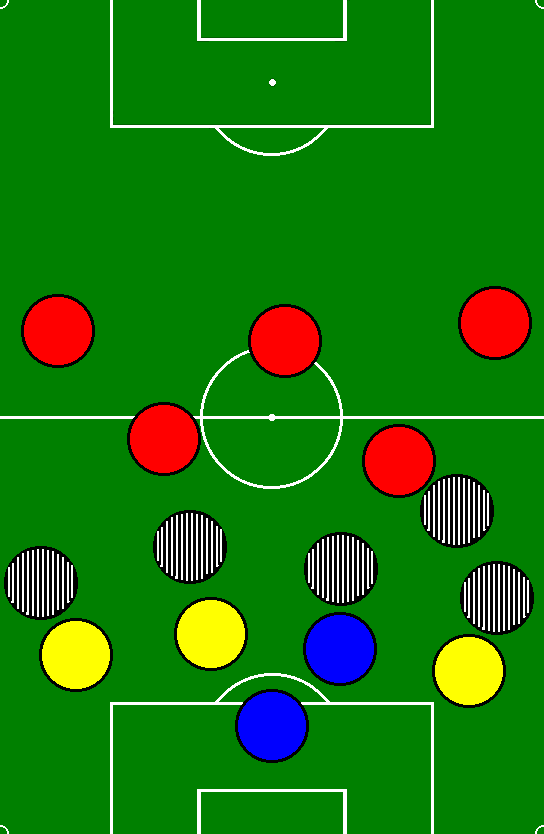 ЗамОк: Футбольна тактична схема